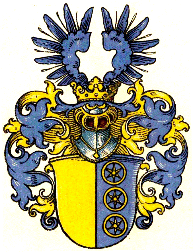 Wappen derer von Rademacher